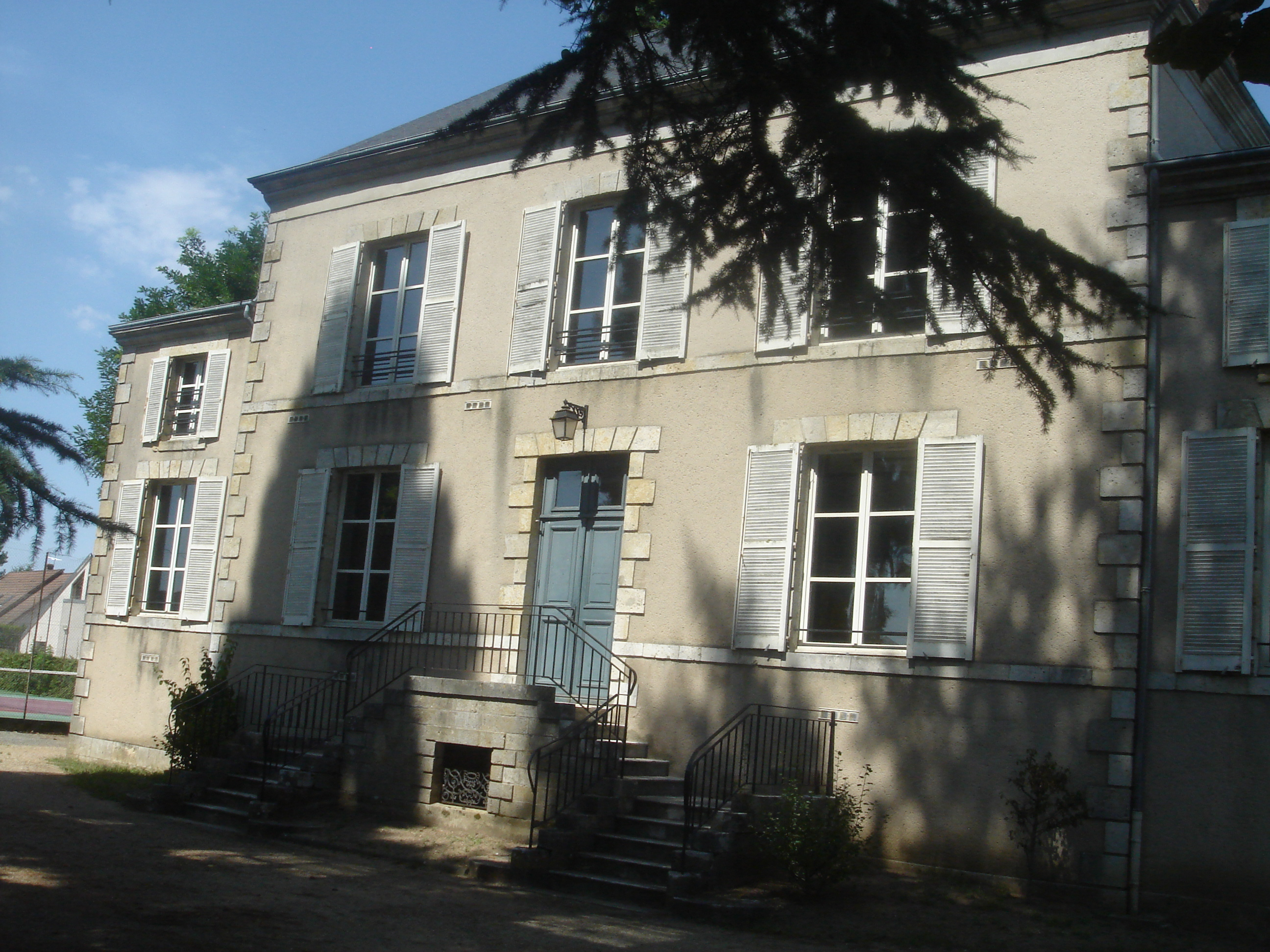 Château de la Cherelle, ancien château privé racheté par la commune et intégré au complexe dit de la Cherelle pour y héberger l'école de musique. Jargeau, Loiret, France.